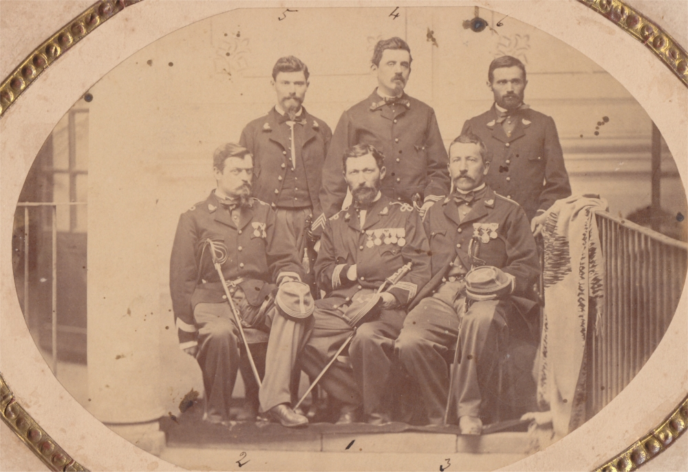 Solados extranjeros del 3° Batallón de cazadores.